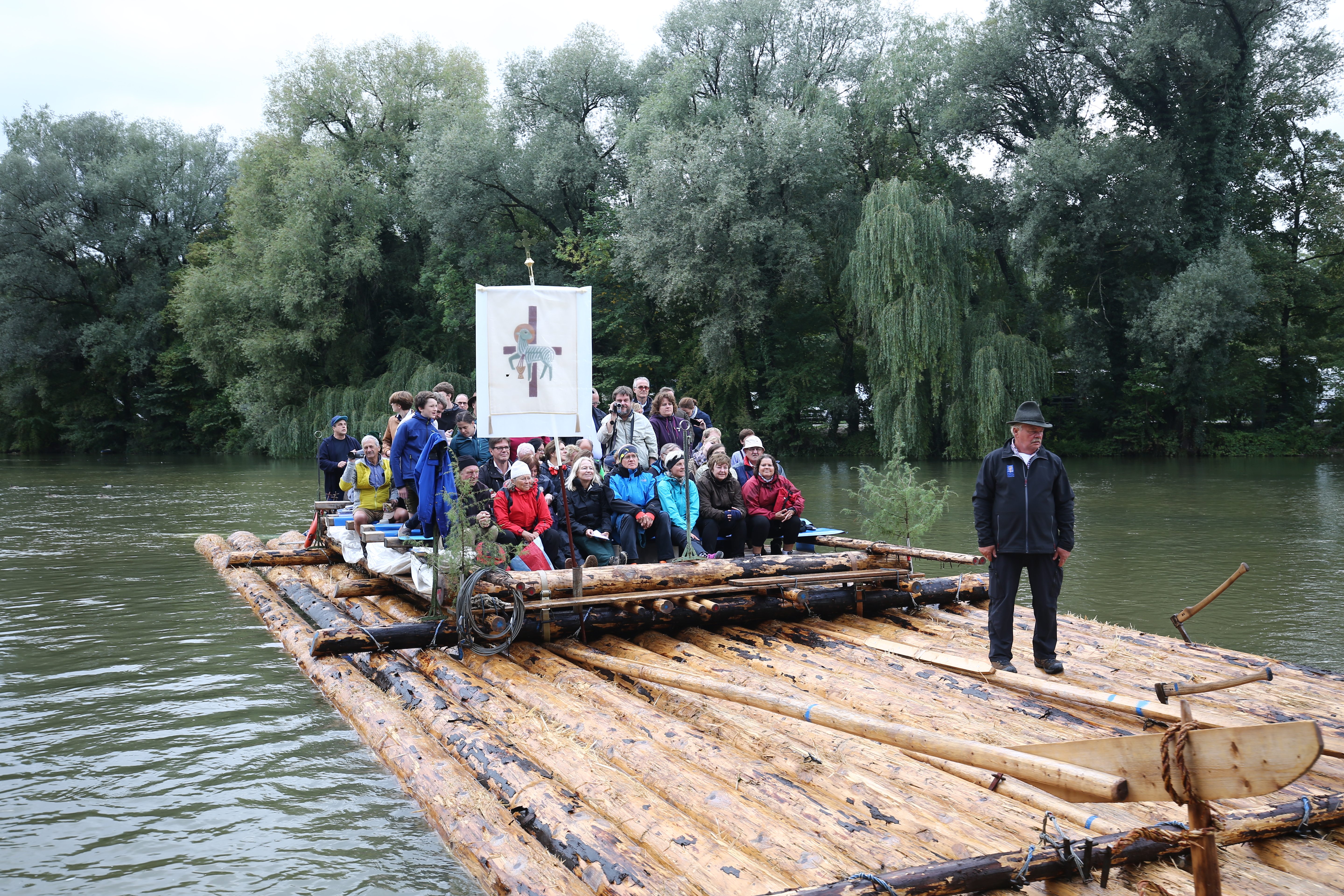 Flößerwallfahrt Thalkirchen 2018. Die Wallfahrt findet im fünf jährigen Turnuns statt und fährt auf der Isar von Wolfratshausen nach München-Thalkirchen. Landung der Flöße an der Floßlände und Prozession zur Kirche St. Maria Thalkirchen. Dort Heilige Messe. 2018 mit Weihbischof emeritus Franz Dietl. Vorne: Floßmeister Michael Angermeier Senior, Wolfratshausen